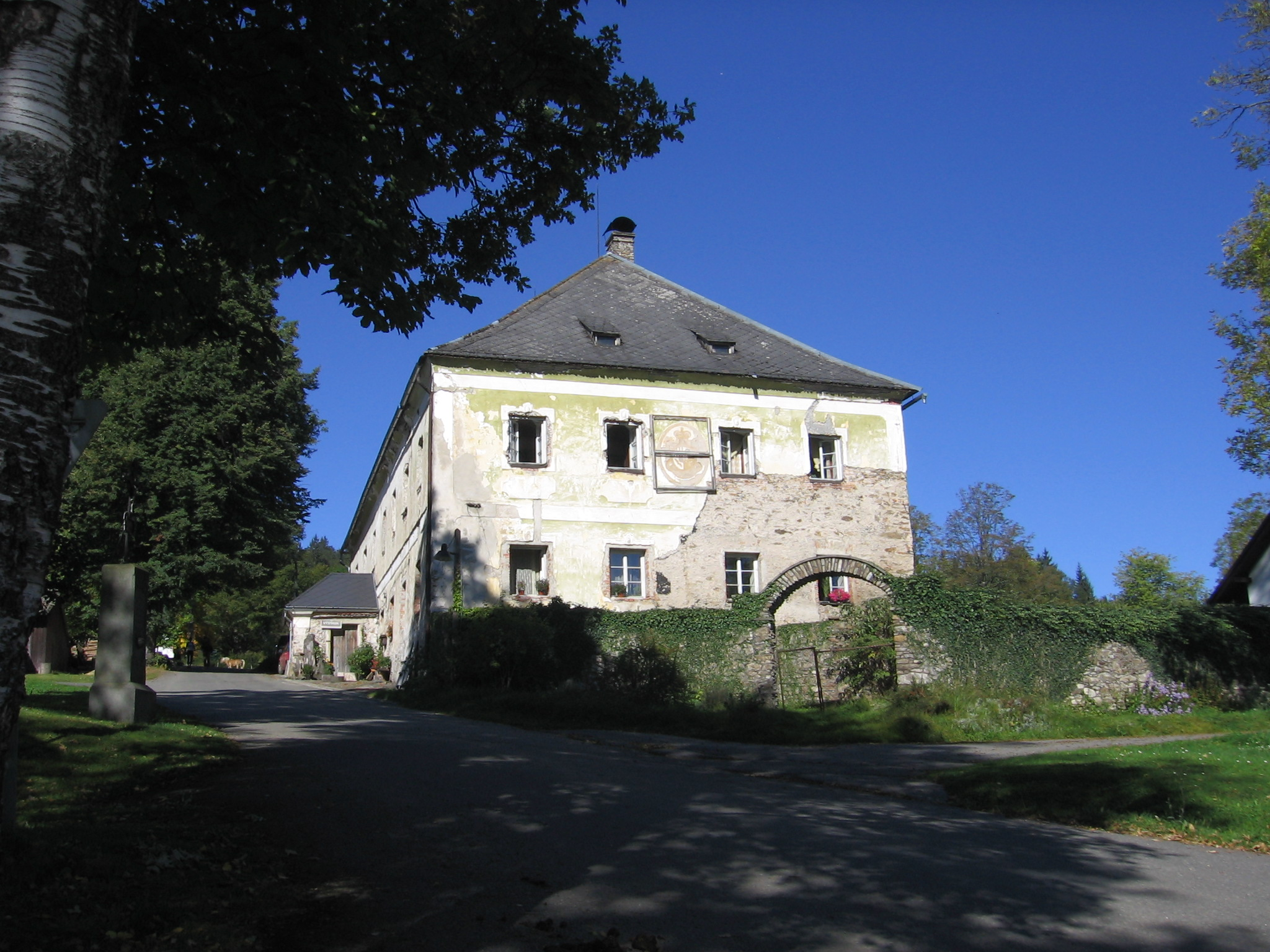 Panský dům, Prášily čp.120, okres Klatovy